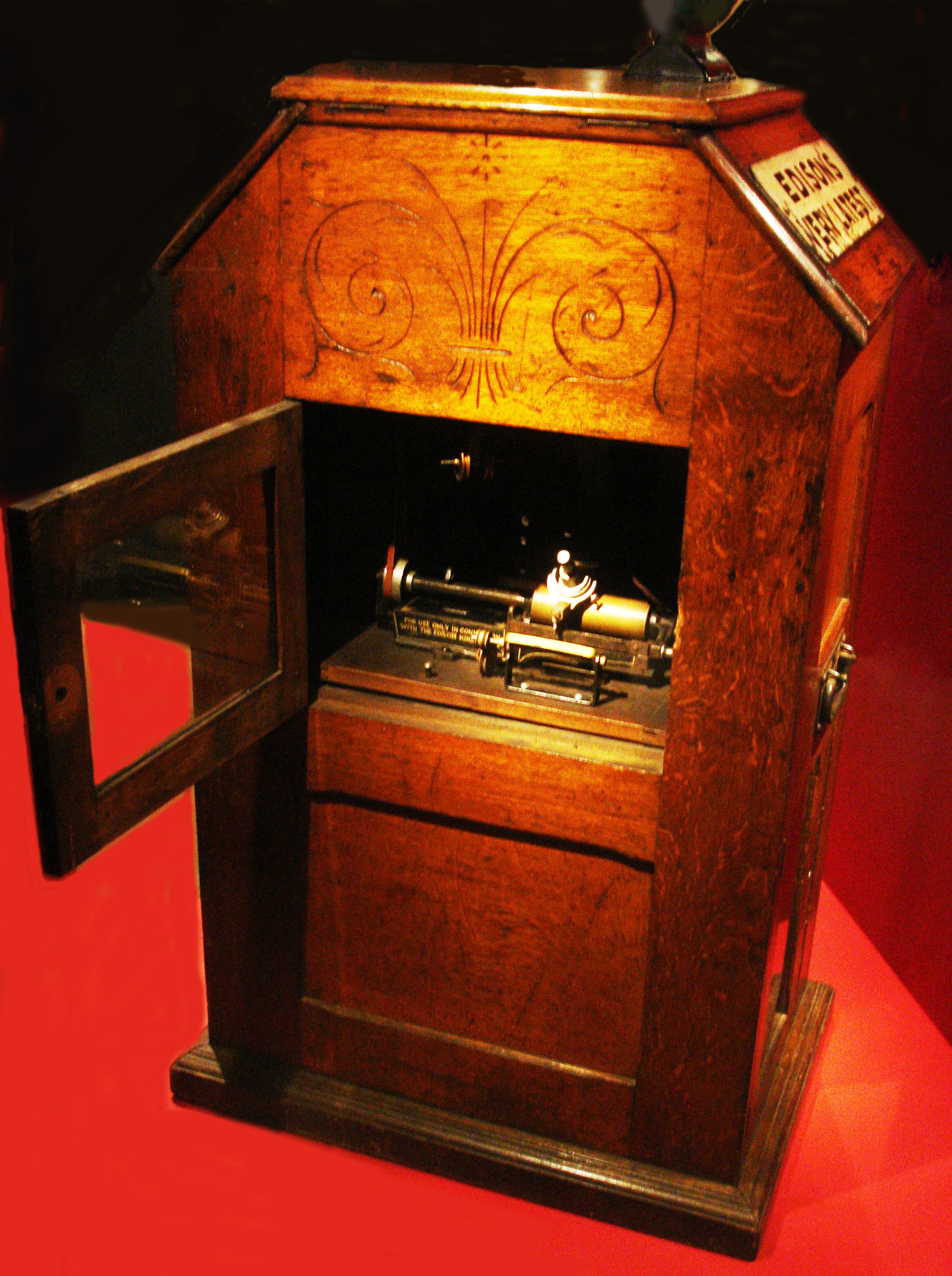 Envers d'un kinétoscope Edison, appelé "kinétophone", couplé avec un phonographe à cylindre de cire.